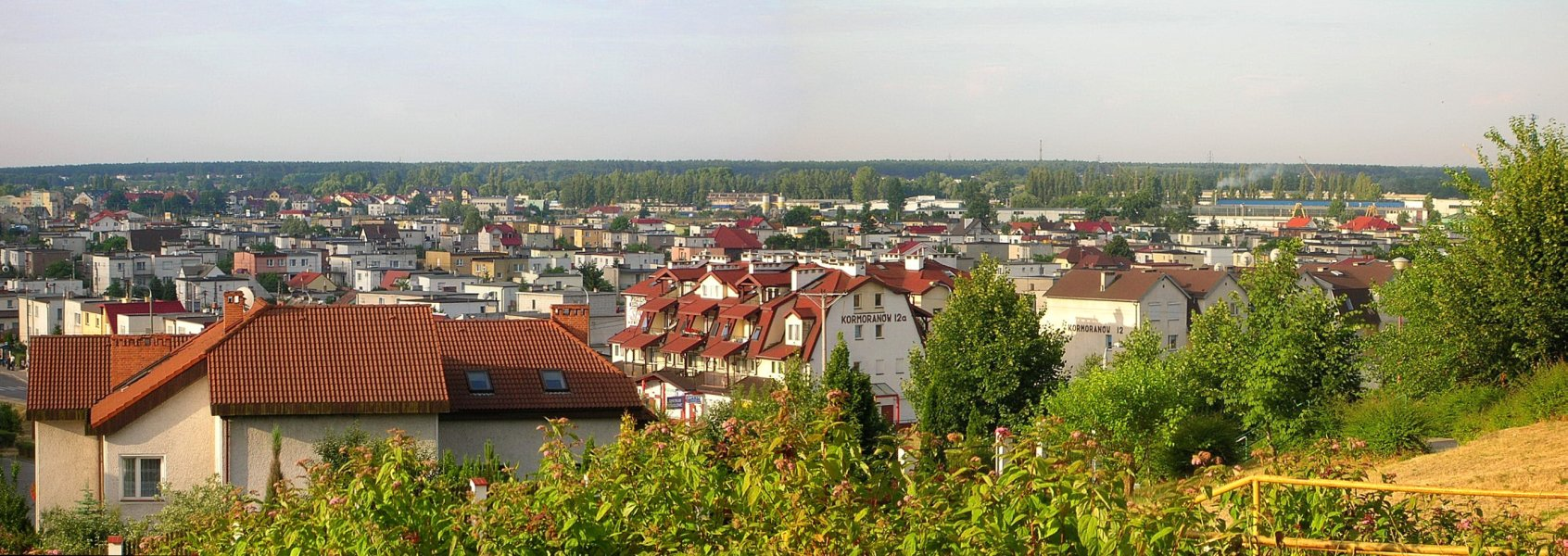 Osowa Góra w Bydgoszczy. Widok ze Zbocza Kruszyńskiego